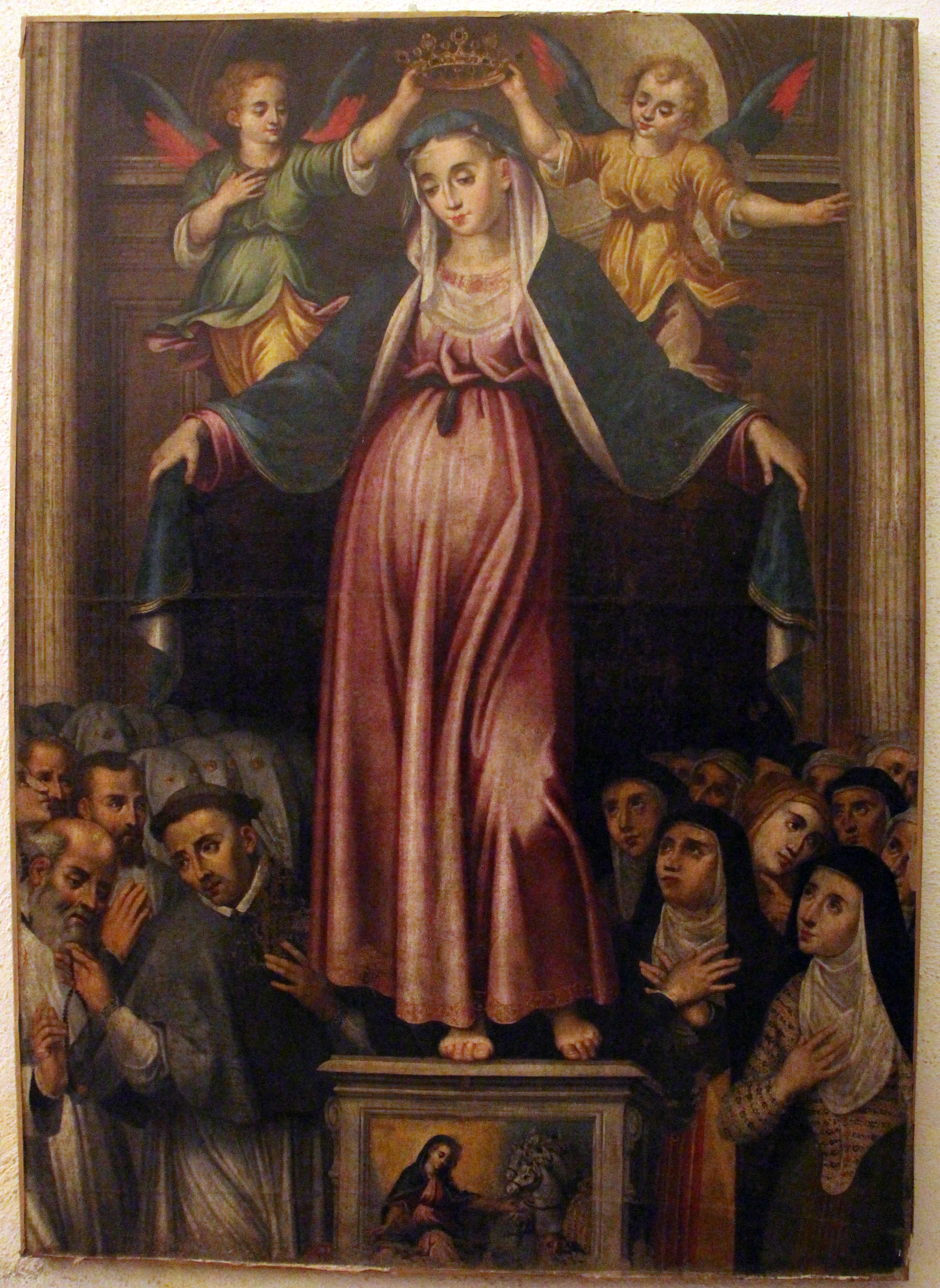 Ploaghe, SS